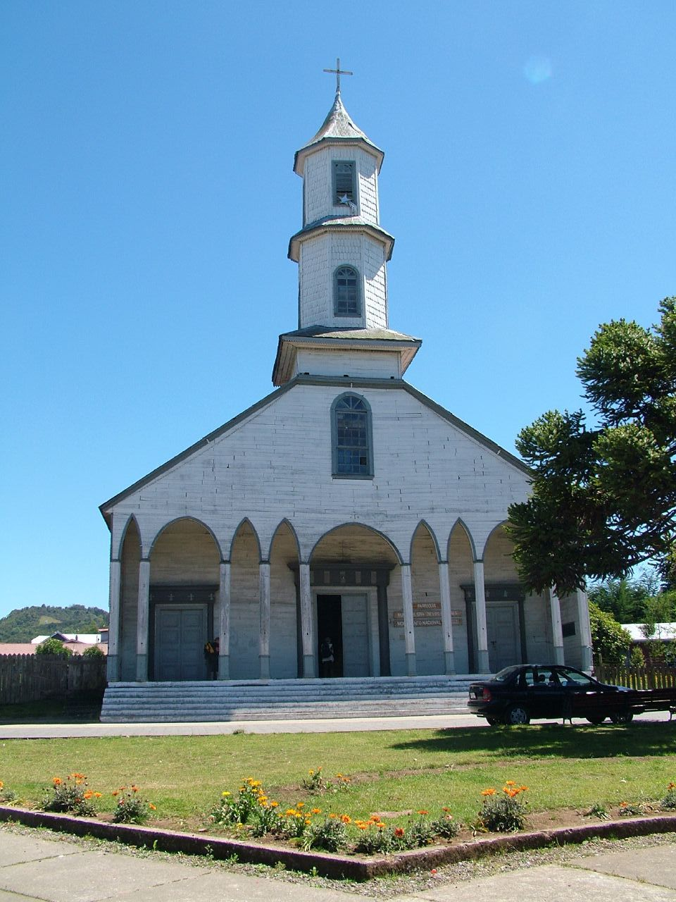 Iglesia Nuestra Señora de los Dolores, en la plaza de Dalcahue, Chiloé (Chile)Dalcahue